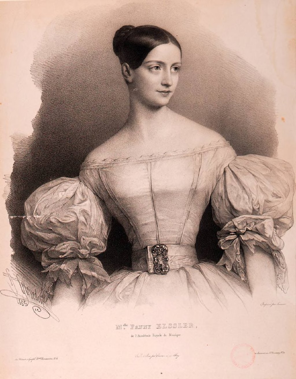 Fanny Elssler (1810-1884), gravure de Grevedon. Paris, BNF.